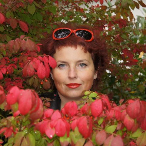 м. Hanau (Німеччина)